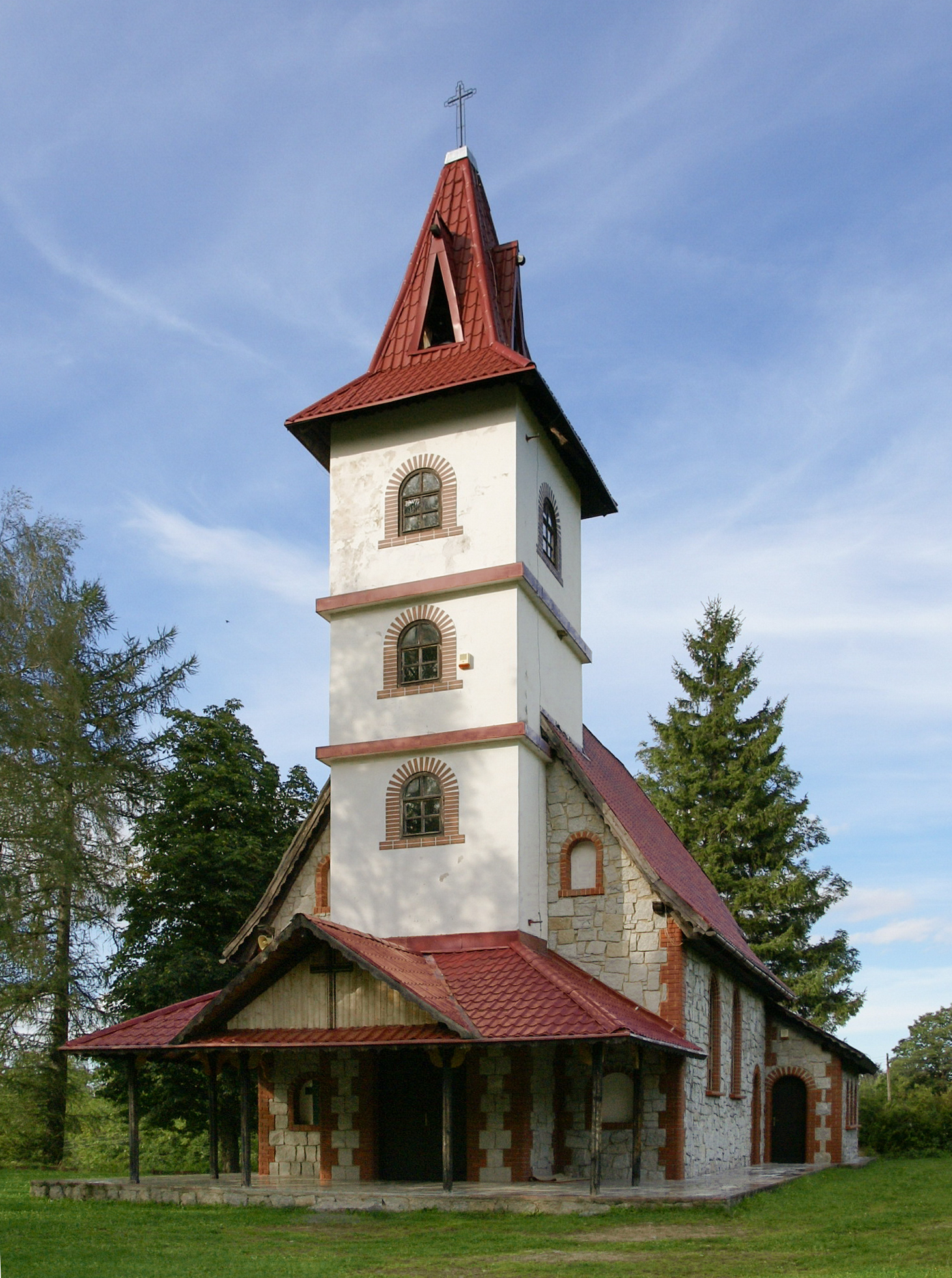 Kościół pw. Matki Bożej Fatimskiej we wsi Borowice, powiat jeleniogórski.